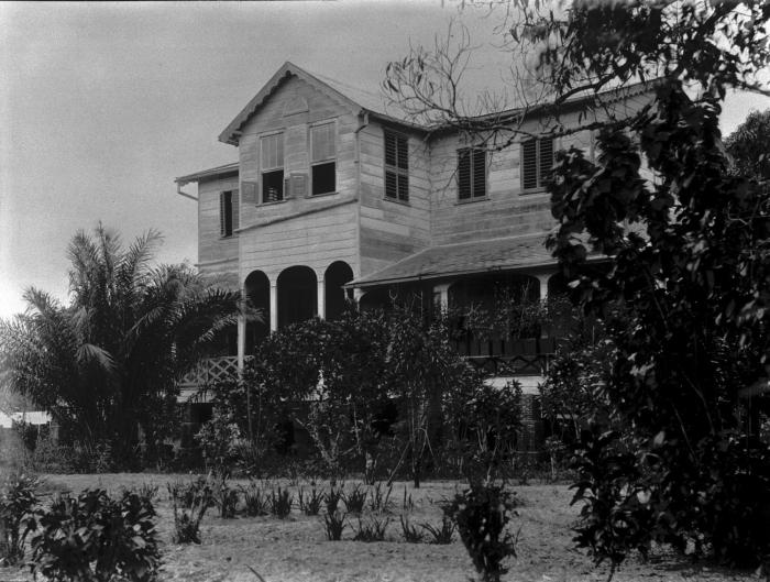 Woonhuis op plantage Belwaarde in de omgeving van Paramaribo